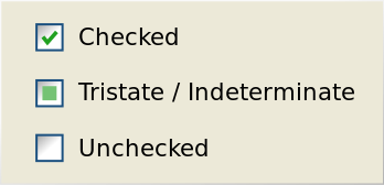 Primer dugmeta za obeležavanje